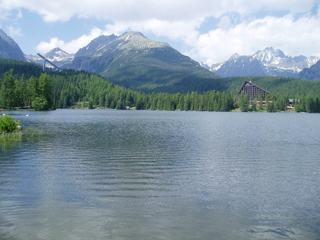 Strbske Pleso Lake